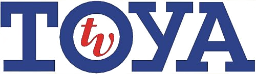 logo kanału